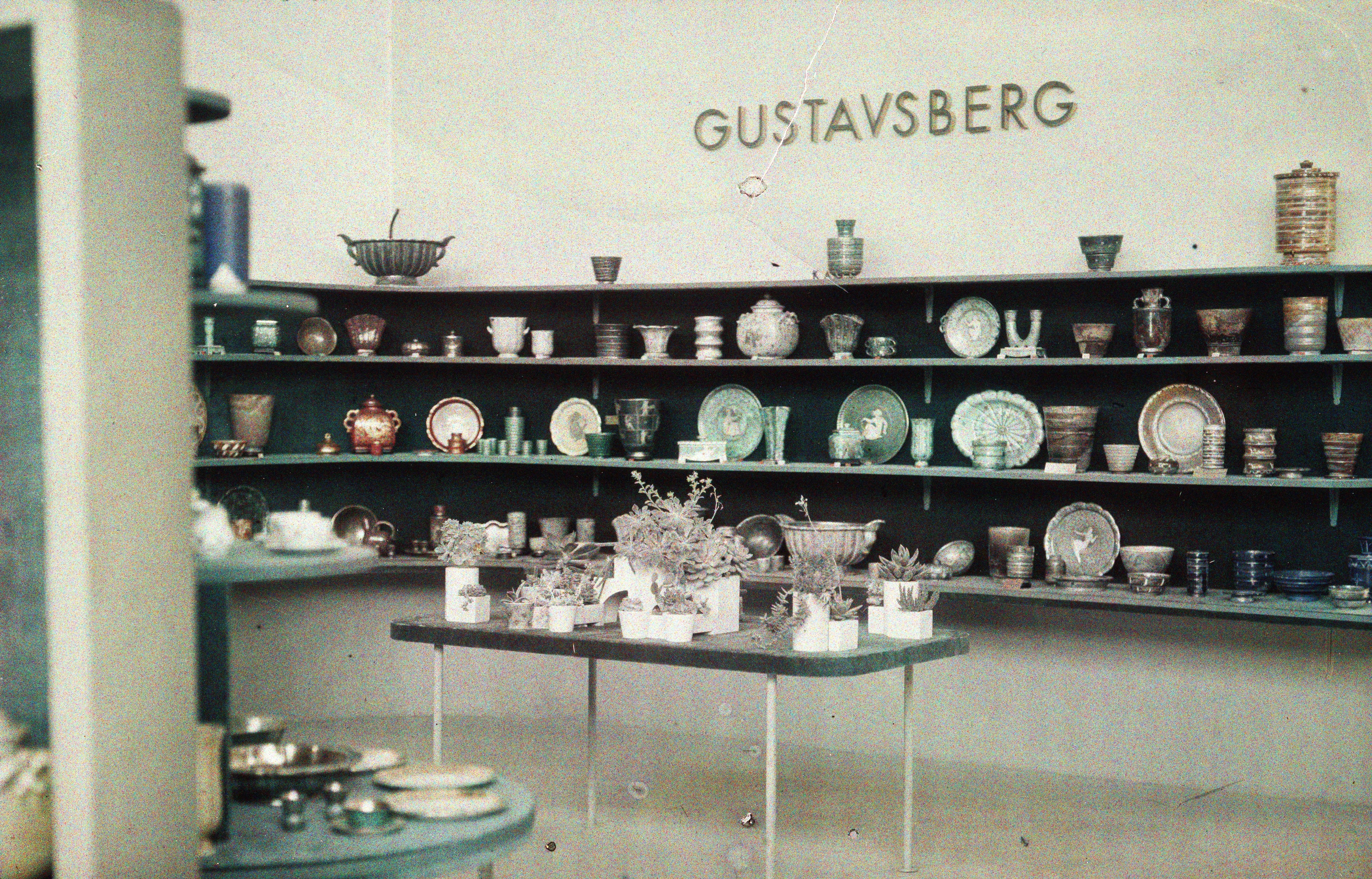 Gustavsbergs porslinsfabrik, monter på Stockholmsutställningen 1930